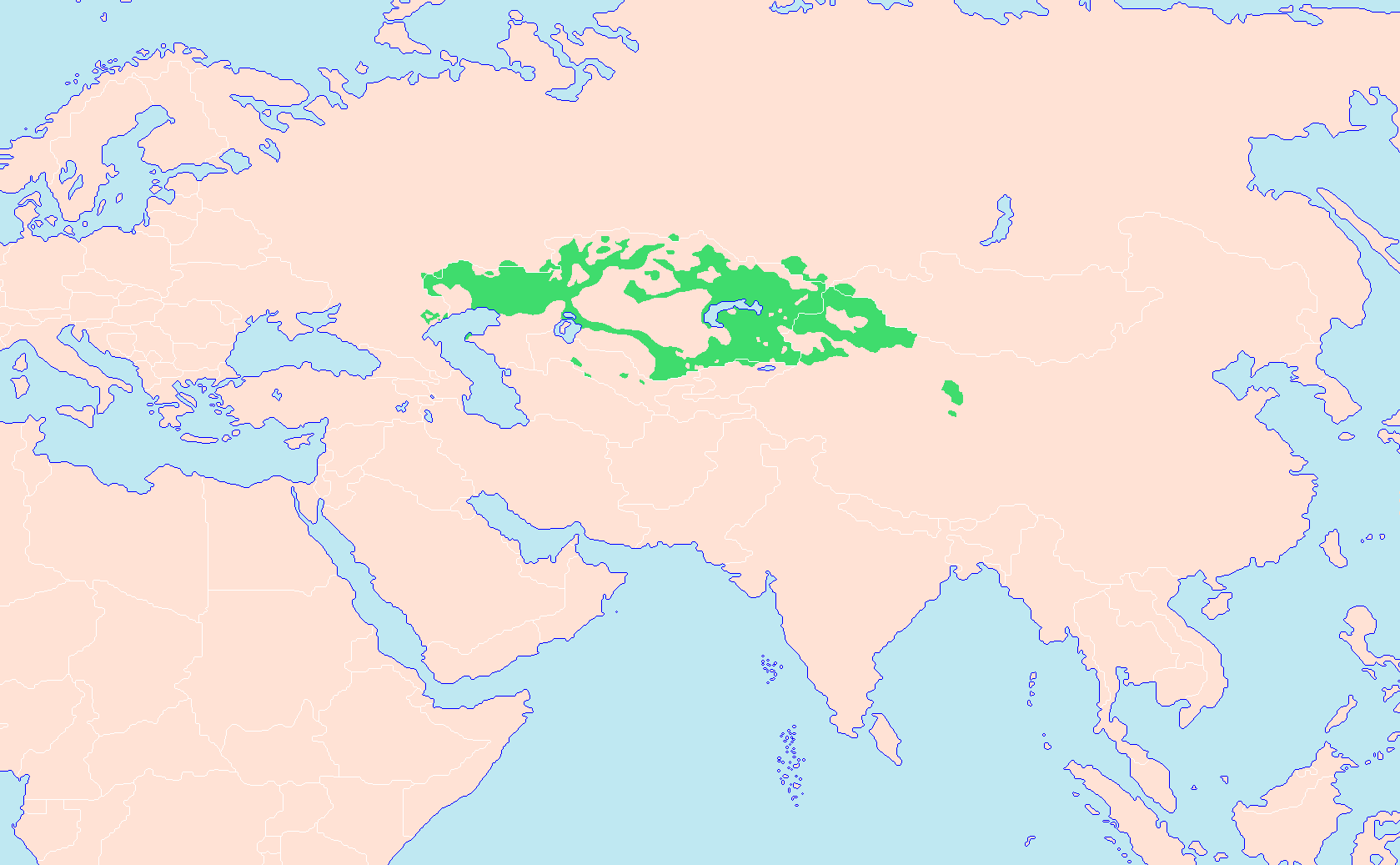 Darstellungskarte der kasachischen Siedlungsgebiete. Das durchgängig grüne Gebiet stellt das mehrheitlich von Kasachen bewohnte Territorium dar. Die Hauptquellen der Karte sind zum einen Helmut Glück (Hrsg.): Metzler Lexikon Sprache, Karte Türkische Sprachen (S. 782), Verlag J. B. Metzler Stuttgart — Weimar 1993, ISBN 3-476-00937-8 und Willi Stegner: TaschenAtlas Völker und Sprachen, Karte Asien ― Völker (S. 92/93), Klett-Perthes Verlag Gotha — Stuttgart 2006, ISBN 3-12-828123-8 und zum anderen der Putzger Historischer Weltatlas, Karte Die Völker der Sowjetunion (S. 136), Cornelsen Verlag 1991, ISBN 3-46400176-8. Bei der noch weiteren Überarbeitung bzw. Erweiterung der Karte werden die verwendeten Quellen in Form von Webseiten noch angegeben werden.